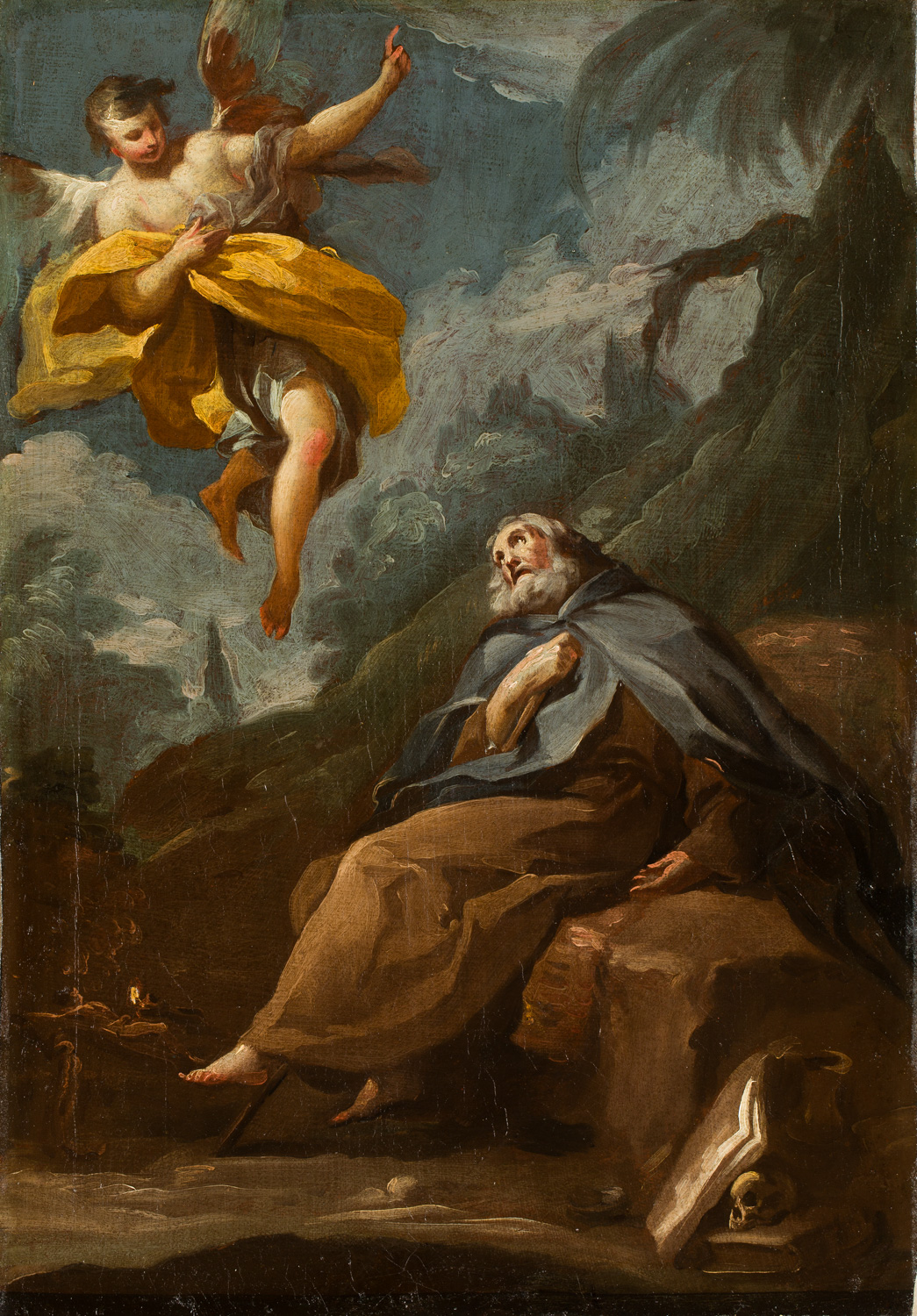 La obra representa a San Antonio Abad (251-356) en actitud extática.